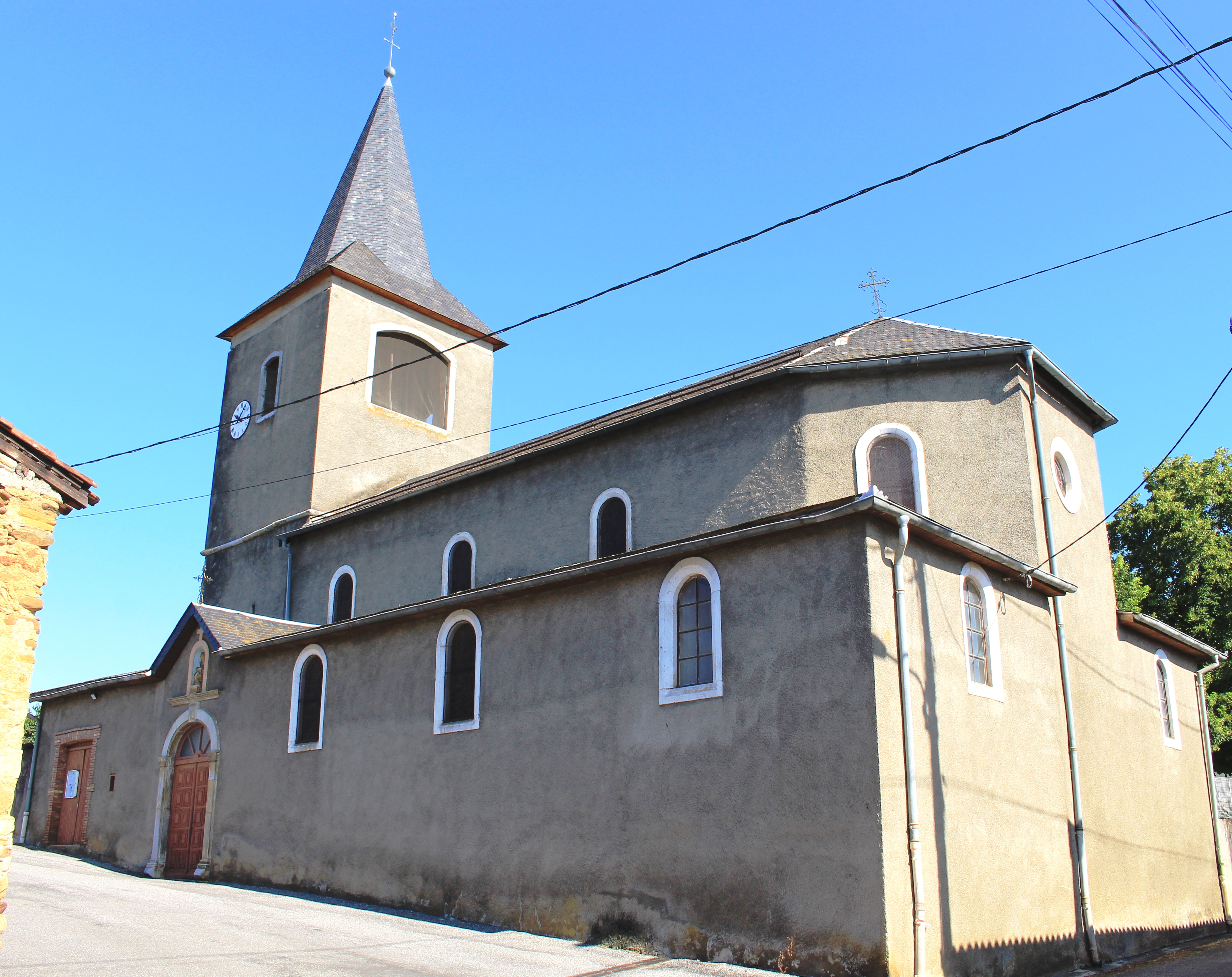 Église Saint-Michel de Campistrous (Hautes-Pyrénées)